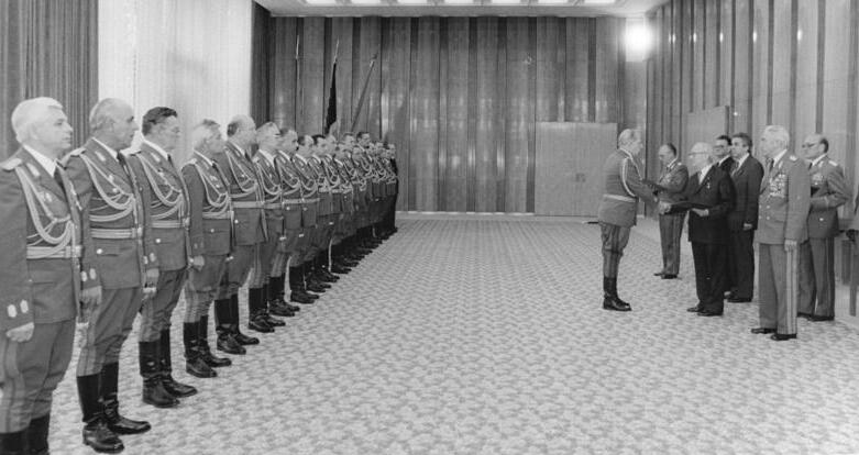 Berlin, Beförderungen und Ernennung von Generalen ADN-ZB Mittelstädt 3.10.84 Berlin: Beförderungen- Der Generalsekretär des ZK der SED, Erich Honecker, Vorsitzender des Staatsrates und des Nationalen Verteidigungsrates der DDR, verlieh an verdienstvolle Angehörige der Nationalen Volksarmee, des Ministeriums für Staatssicherheit und des Ministeriums des Innern den Scharnhorst-Orden und beförderte und ernannte Generäle. Zugegen waren Egon Krenz (3.v.r.), Mitglied des Politbüros und Sekretär des ZK der SED, Armeegeneral Heinz Hoffmann (vorn rechts), Minister für Nationale Verteidigung.